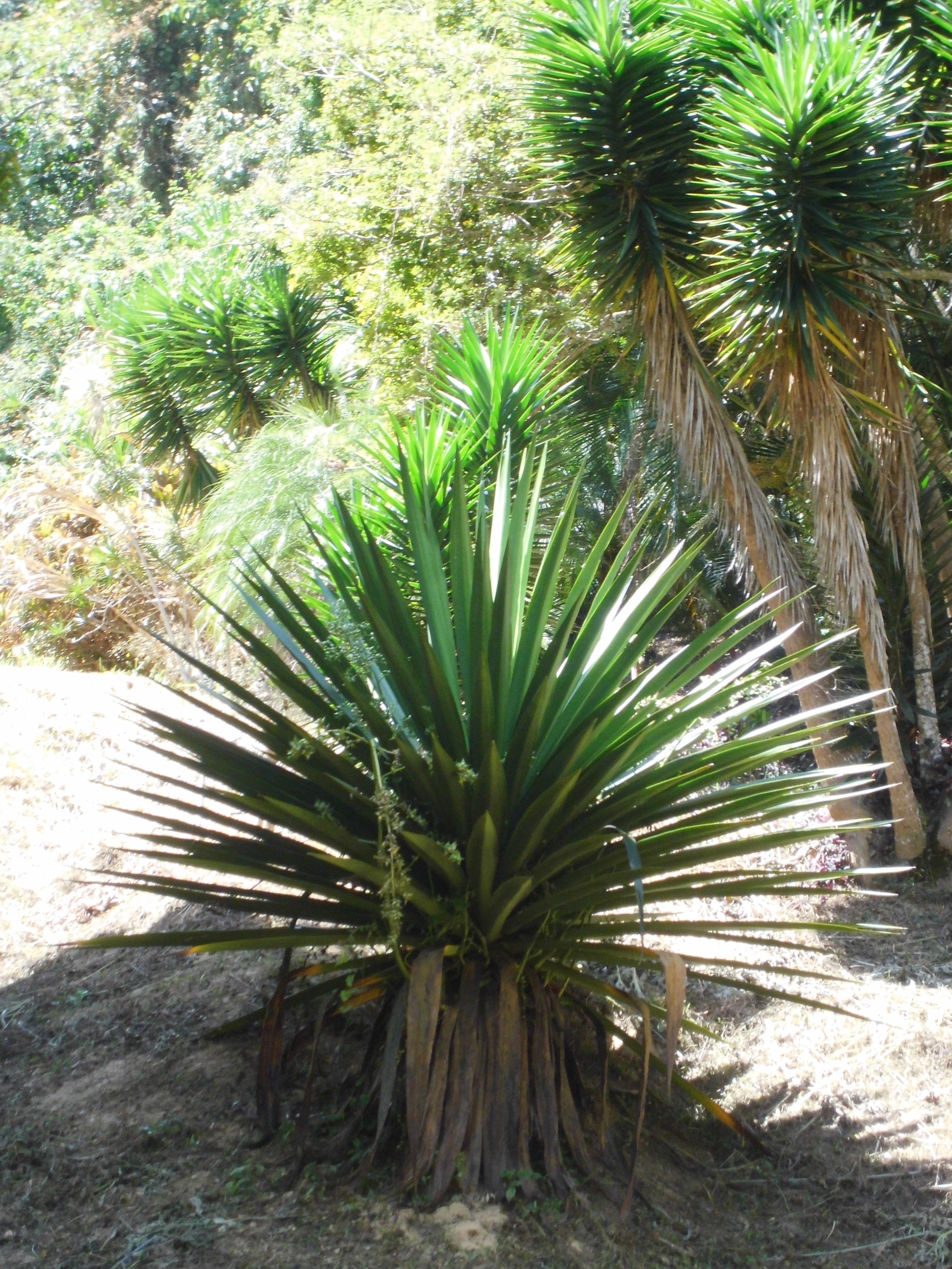 Agave tequilana F.A.C. Weber, localizadas en la Boyera, estado Miranda - Venezuela